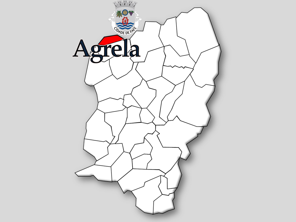 Censos 1864/2011